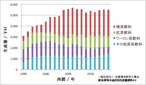 日本国内の茶系飲料の生産量推移。全国清涼飲料工業会の清涼飲料水品目別生産量推移のデータを基に作成。